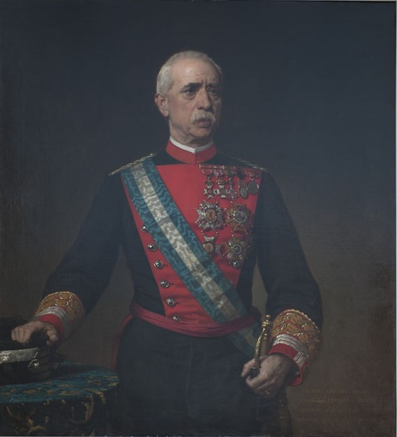 Primer Marques de la Cenia